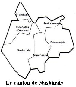 Le canton de Nasbinals Image personnelle